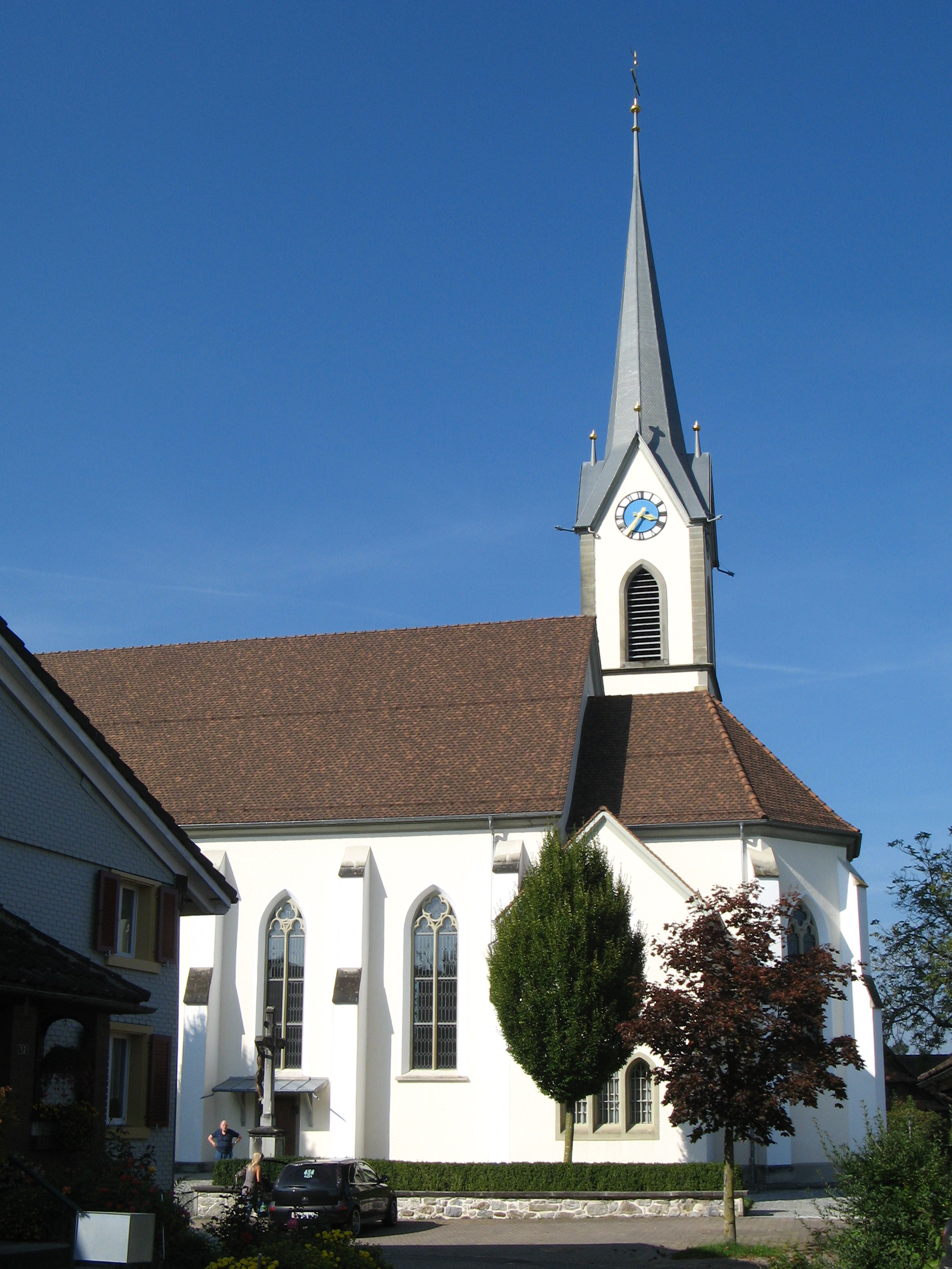 Pfarrkirche St. Rupert in Oberrüti, Aussenansicht